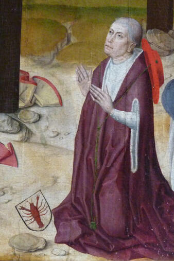 Nicolaus de Autricuria